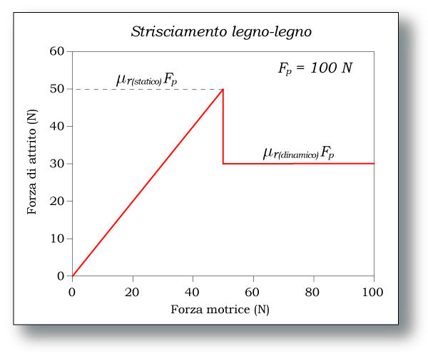 Rielaborazione personale di Immagine:Attrito radente.jpg - segue la licenza della precedente, di cui si riportano i dati. Pagina di descrizione Attrito statico e dinamico. Se la forza di motrice Fm è minore di μrs Fp, allora l'attrito è pari a Fm e il corpo non si muove; se Fm supera μrsFp, il corpo inizia a muoversi; per valori di Fm ancora maggiori, l'attrito (dinamico) è sempre costante e pari a μrd Fp. Fonte: L'autore dell'immagine ha effettuato l'upload e non ci sono problemi di copyright. Cronologia della descrizione * (corr) (prec) 13:24, 19 dic 2004 Lukius (messo template GFDL sulla fiducia, chiederò conferma all'autore :)) * (corr) (prec) 22:29, 18 dic 2004 Marc Lagrange * (corr) (prec) 22:24, 18 dic 2004 Marc Lagrange (attrito statico e dinamico) Cronologia dell'immagine * (canc) (corr) 23:36, 20 dic 2004 . . Marc Lagrange (Discussione) . . 417x358 (22755 bytes) * (canc) (ripr) 23:34, 20 dic 2004 . . Marc Lagrange (Discussione) . . 417x358 (22755 bytes) (Ripristinata versione precedente) * (canc) (ripr) 23:34, 20 dic 2004 . . Marc Lagrange (Discussione) . . 417x358 (22755 bytes) * (canc) (ripr) 22:24, 18 dic 2004 . . Marc Lagrange (Discussione) . . 417x358 (22755 bytes) (attrito statico e dinamico) Categoria:Immagini esclusivamente in GNU FDL